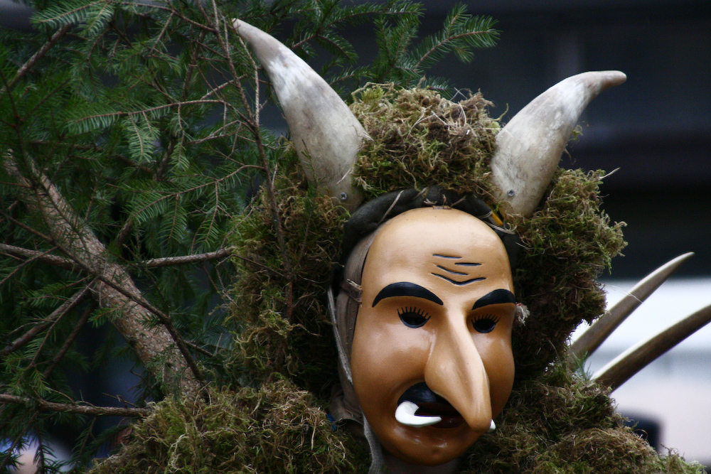 Pust - glavni igralec na cerkljanskem pustnem običaju - predstavlja zimo, pred sodnikom je obsojen na smrt, zato da lahko končno nastopi pomlad. Celotna obleka tehta okrog 100 kilogramov. Obleka je ročno narejena iz mahu, njegova pustna maska pa je iz lesa, kar je značilno za vse laufarje